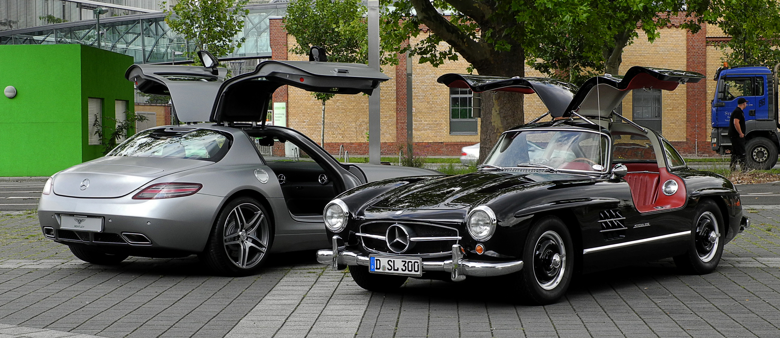 Mercedes-Benz SLS AMG (C 197) & Mercedes-Benz 300 SL (W 198)